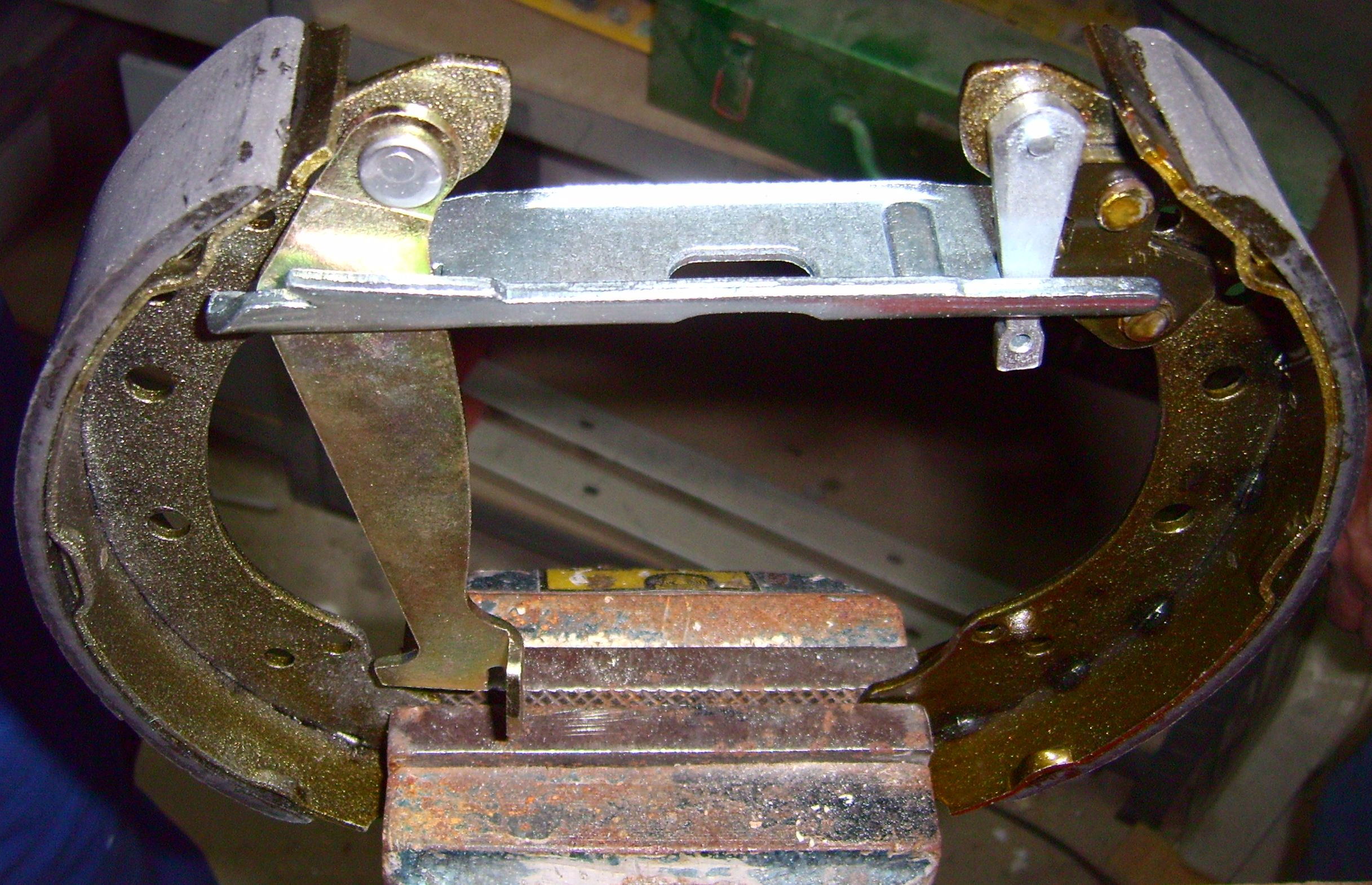 Bremsbacken, Betätigungsstange, Nachstellkeil als ausgebaute Teile einer Trommelbremse eines Škoda Fabia I (2003)